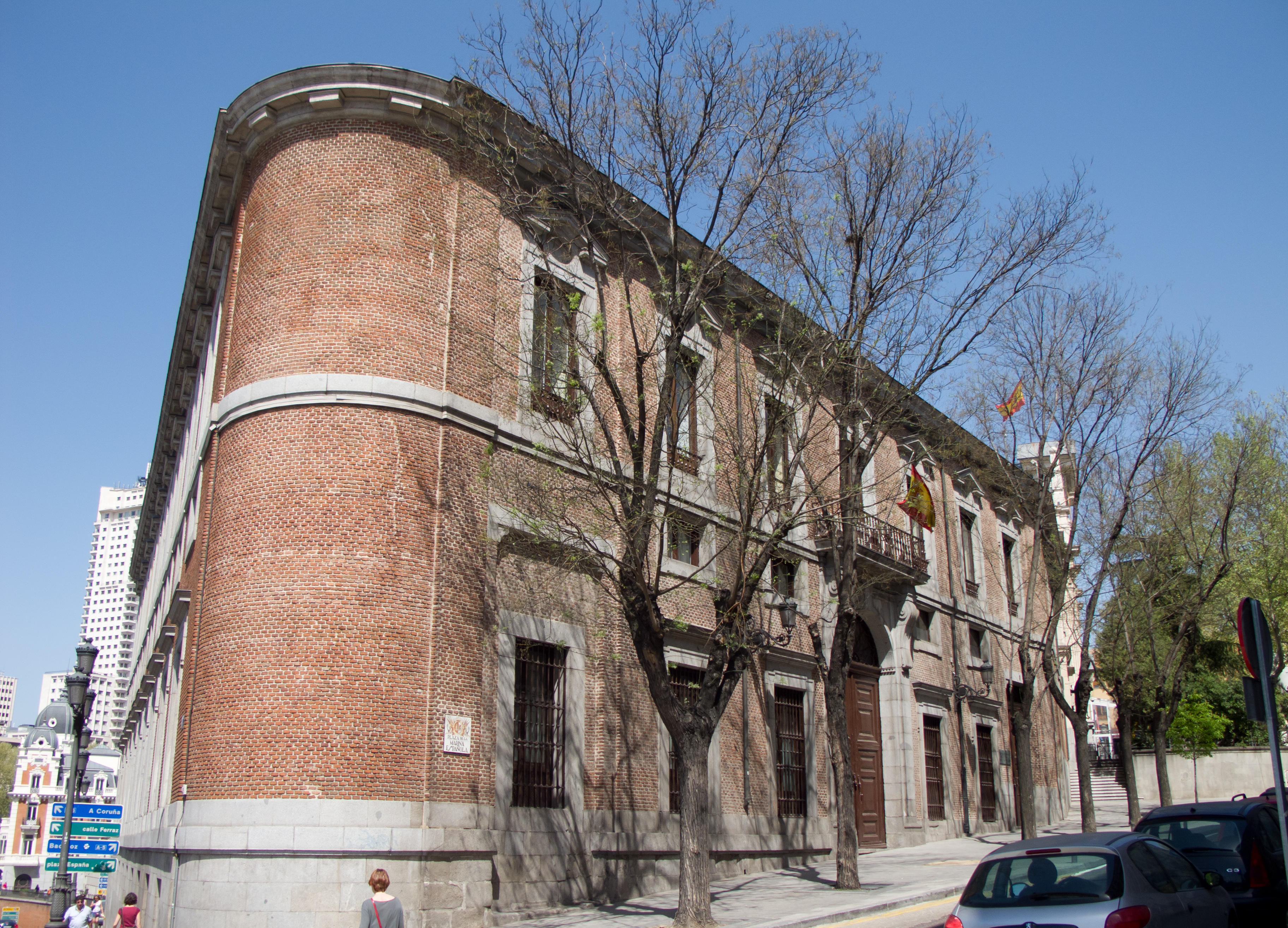 Palacio del Marqués de Grimaldi, Madrid, España.